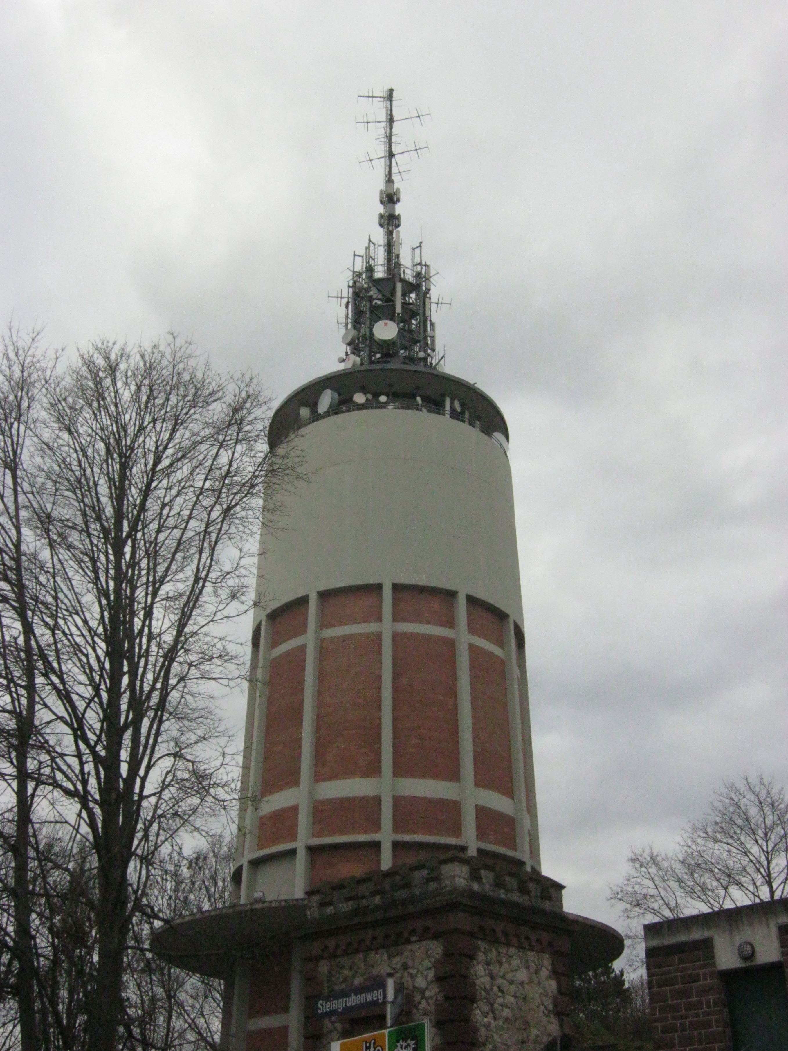 Wartbergturm Pforzheim